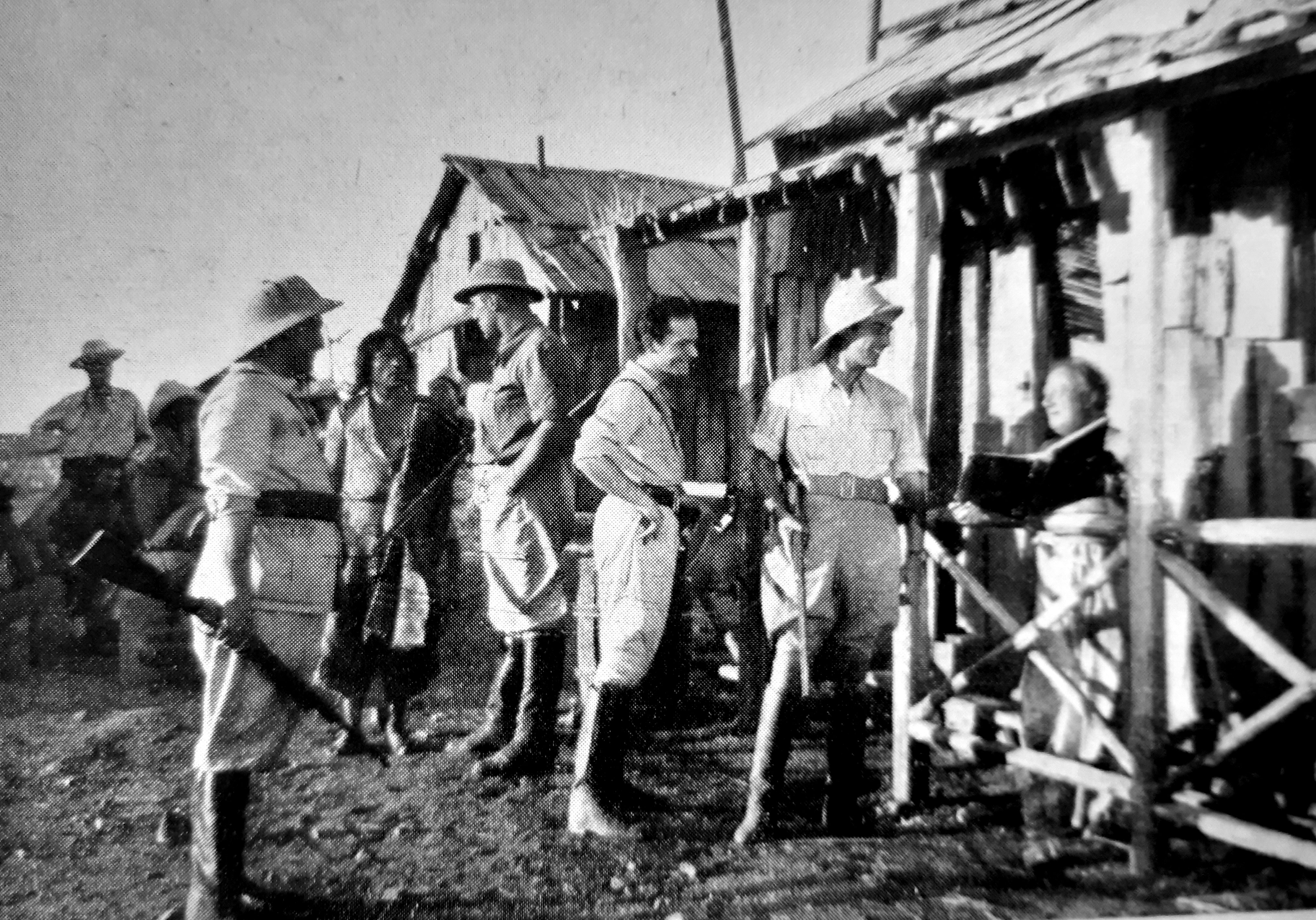 Fotogramma di Senza cielo, regia A. Guarini . prod "Continentalcine", Roma, 1940. Il villaggio ricostruito negli studi di Cinecittà